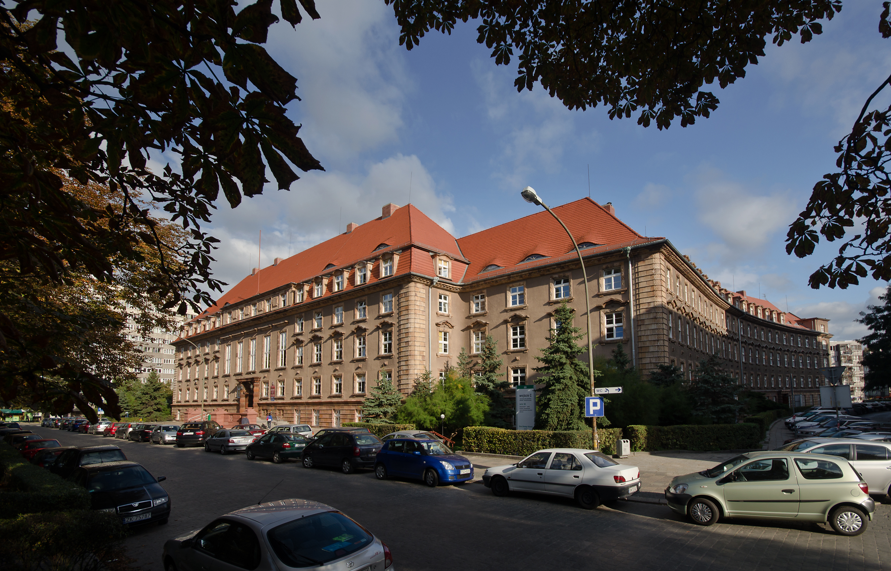 Wrocław Krzyki, Pretficza 9-11 / Łączności 8 - gmach Zakładu Ubezpieczeń Społecznych (zabytek A/2267/503/Wm)